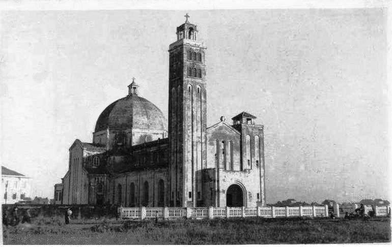 Ảnh chụp Giáo hoàng Chủng viện Thánh Albertô Cả thời Pháp thuộc.